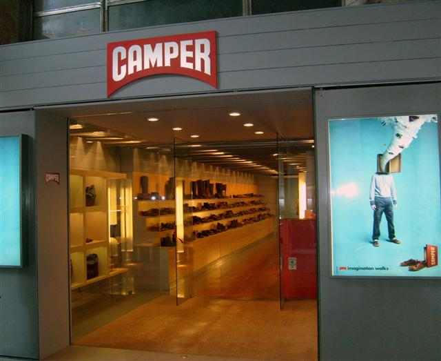 Camper store in Palma